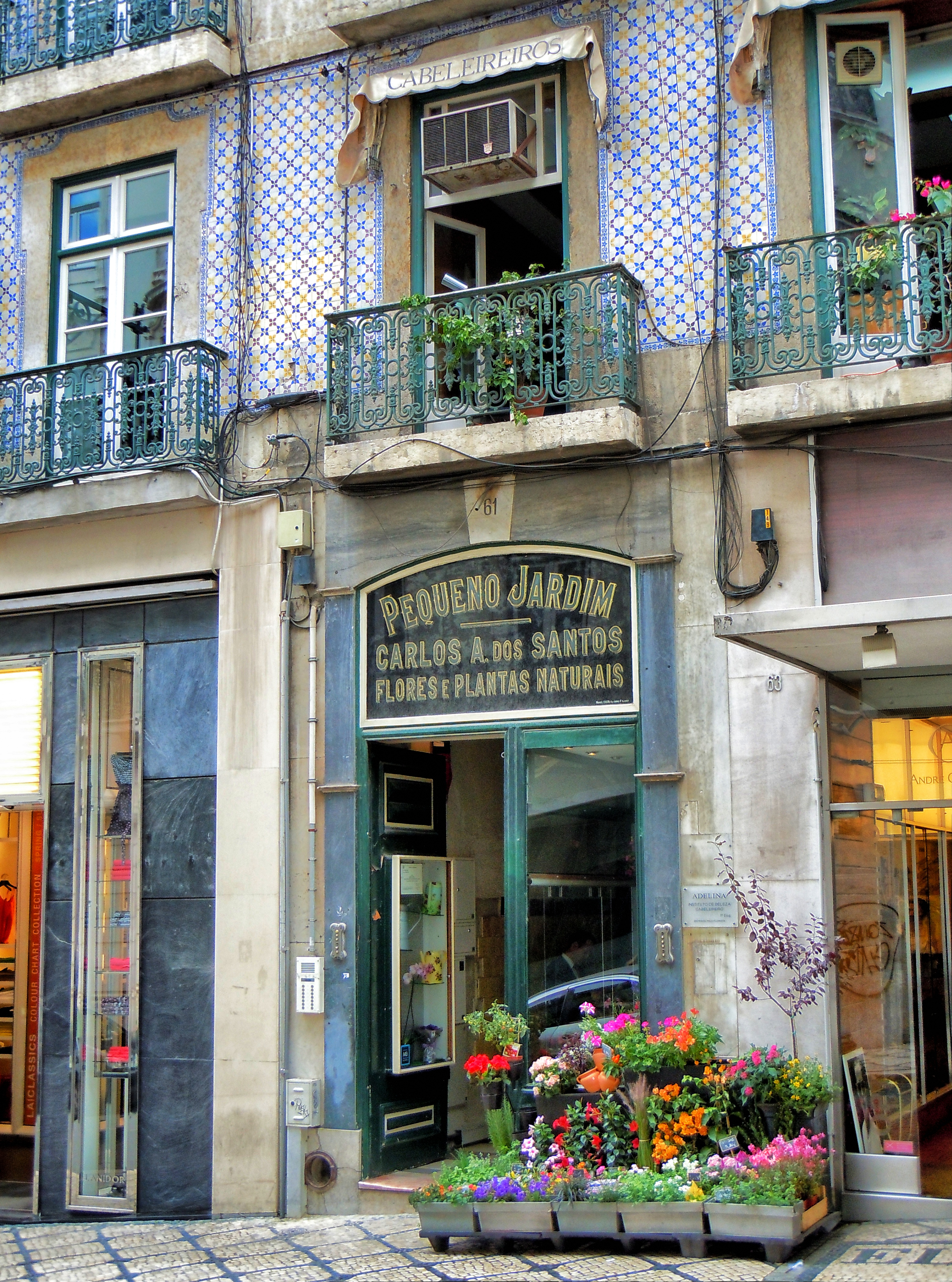 Pequeno Jardim